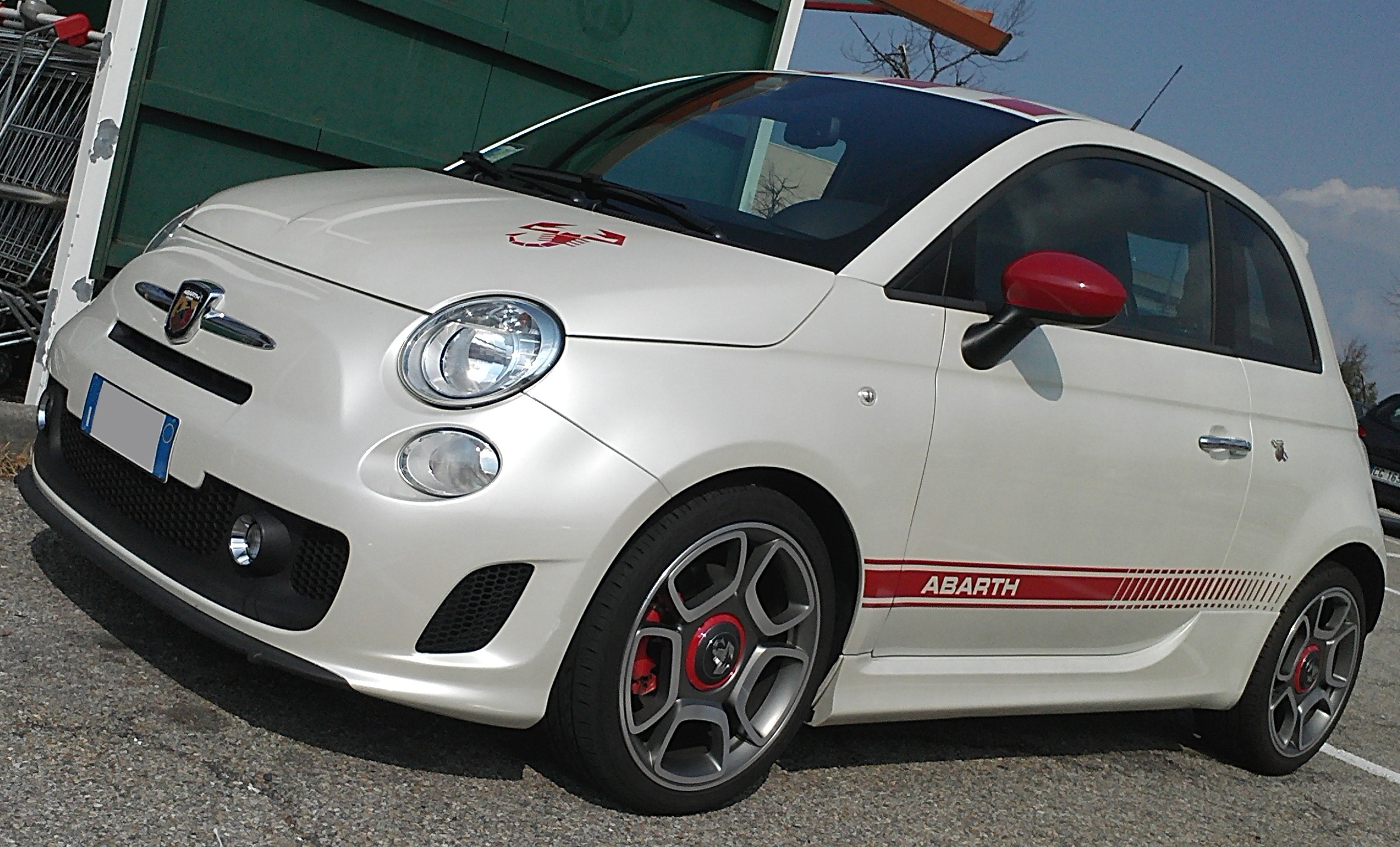 Abarth 500 da 135cv